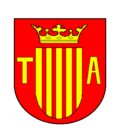 Escut municipal antic de Talarn (Pallars Jussà)